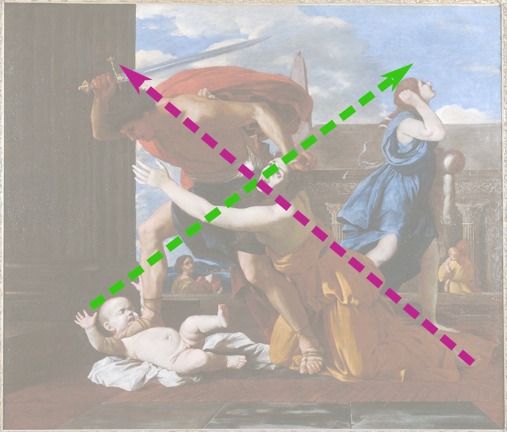 Composition du Massacre des Innocents de Nicolas Poussin conservé au Musée Condé, Chantilly. D'après la Fiche de l'œuvre du Portail éducatif du domaine de Chantilly - Académie d'Amiens